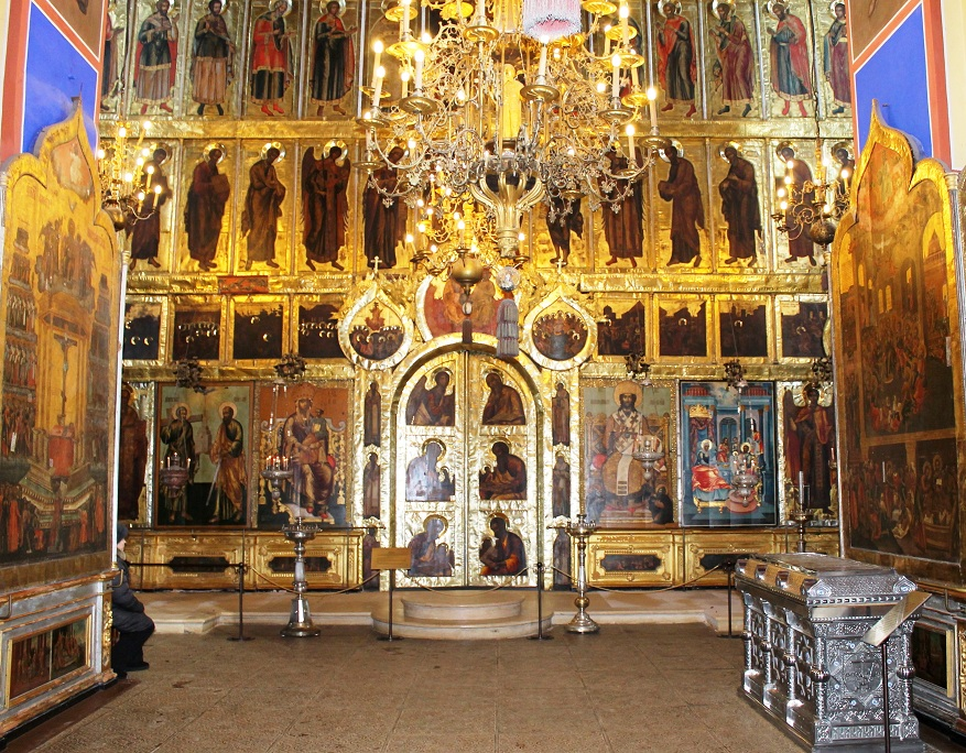 Рака с мощами Святителя Арсения Элассонского. Автор Звёздкин В.А.